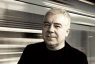 Foto de Nei Lisboa